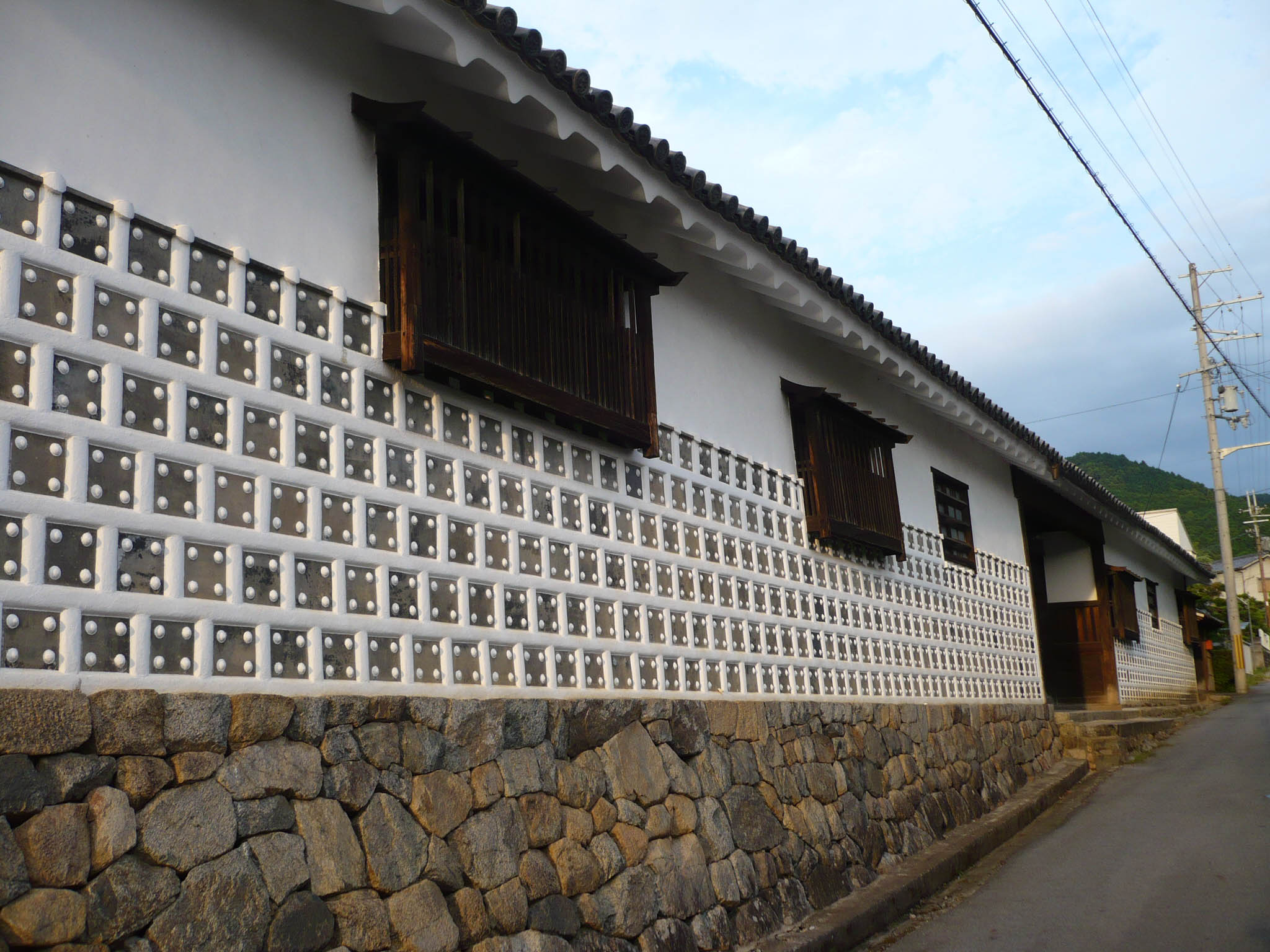 植村家長屋門